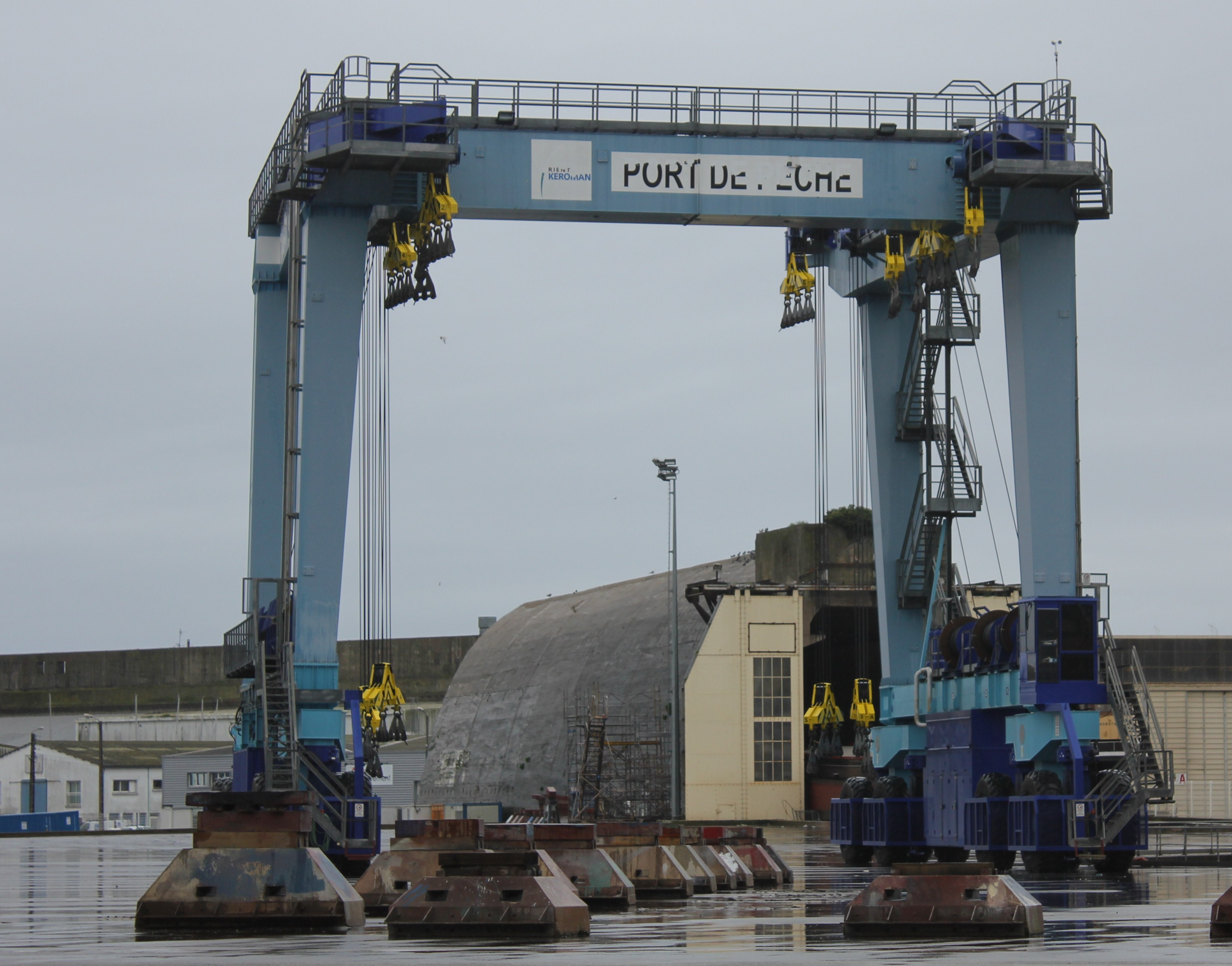 ascenseur à bateaux dans le port de pêche de Keroman à Lorient